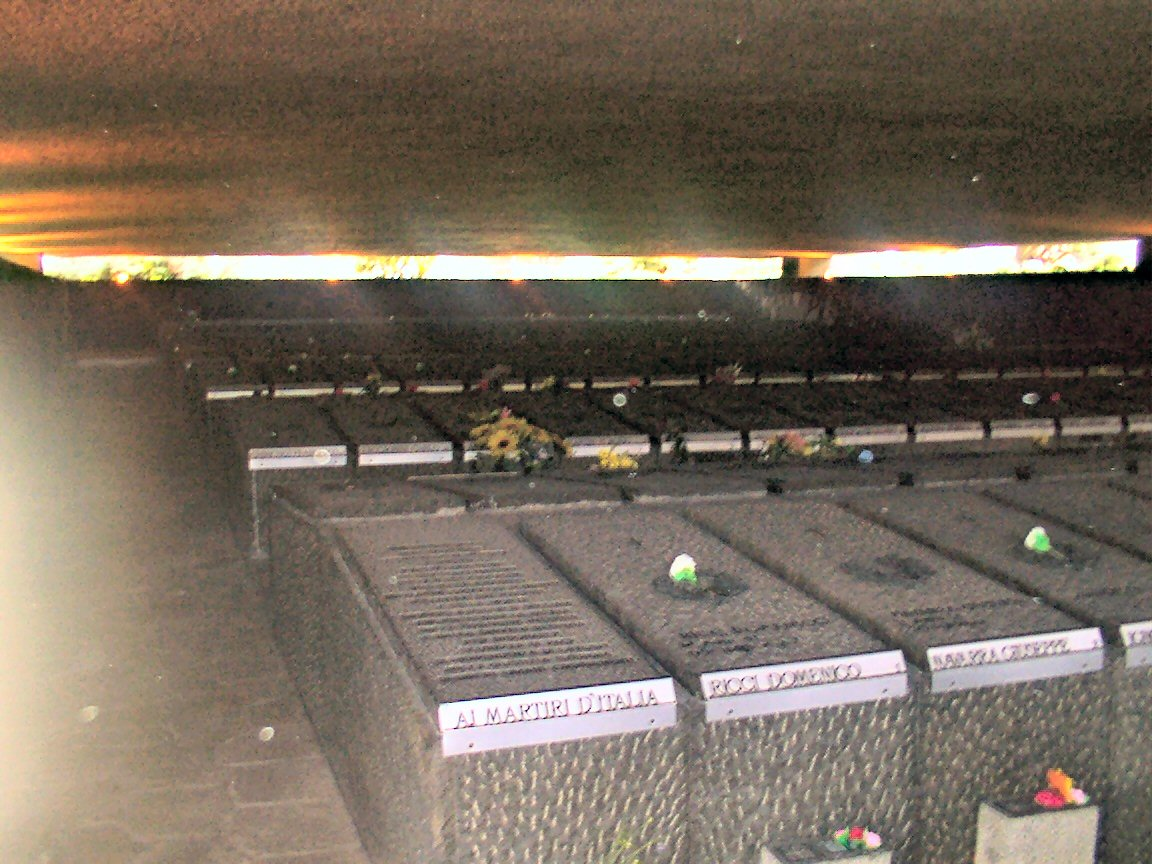 המצבות בארדיאטינה